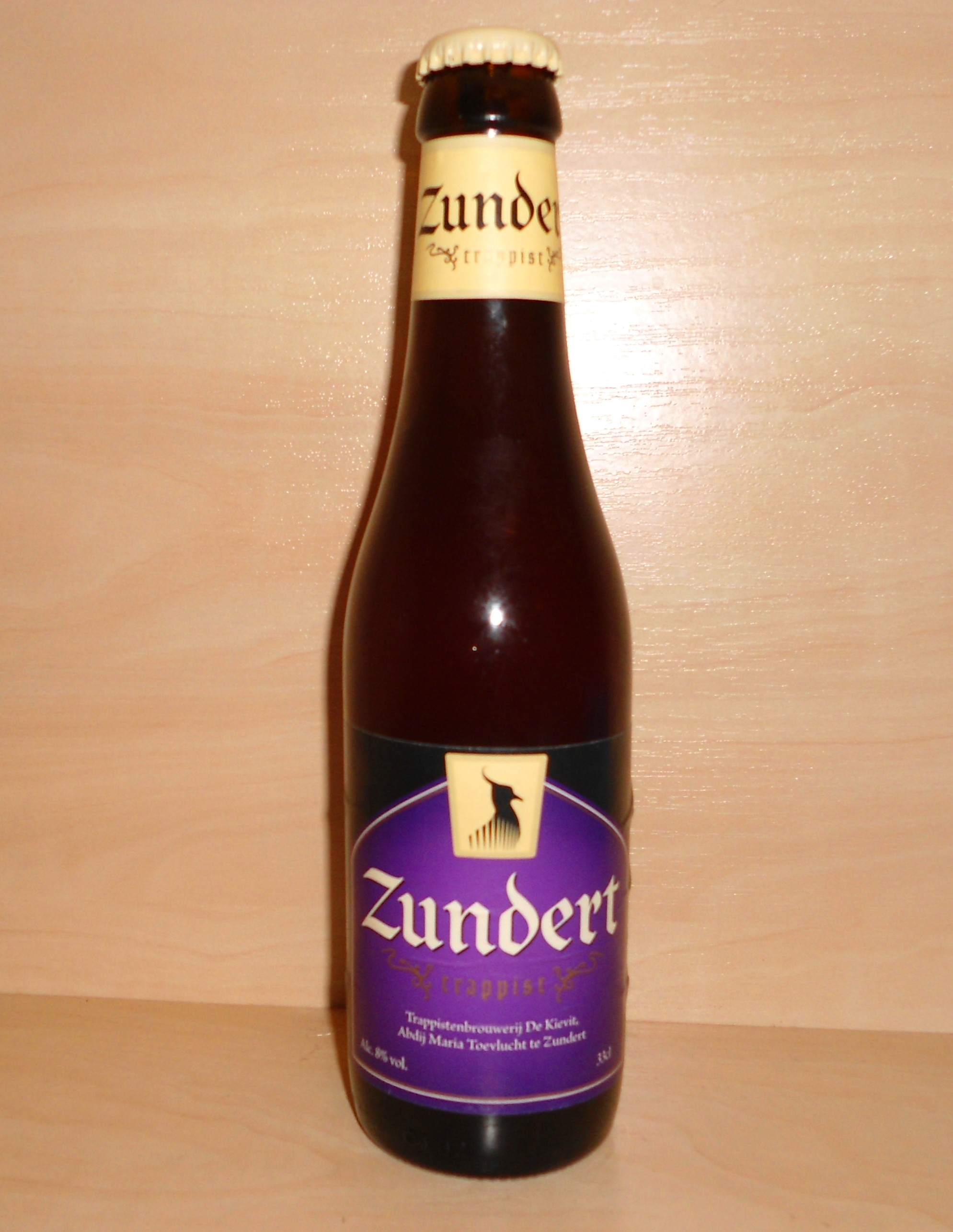 Zundert bière trappiste néerlandaise